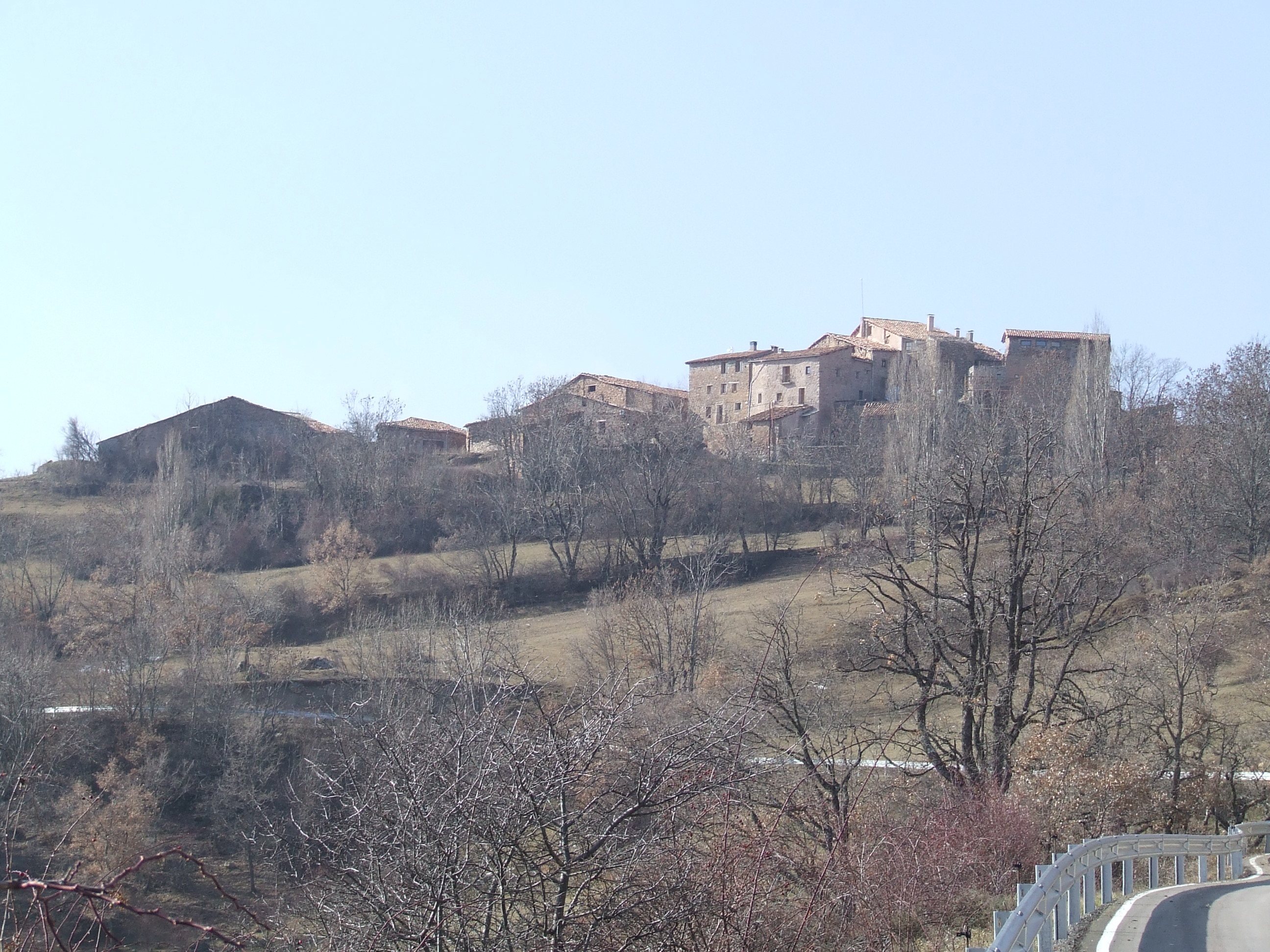 Antist (la Pobleta de Bellveí, la Torre de Cabdella, Pallars Jussà)